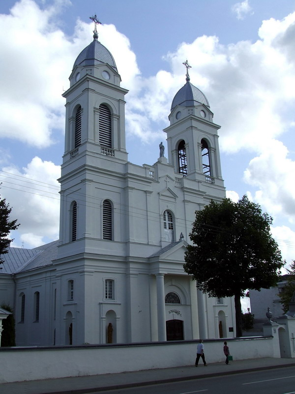 Švč. Trejybės church. Garliava, Lithuania.